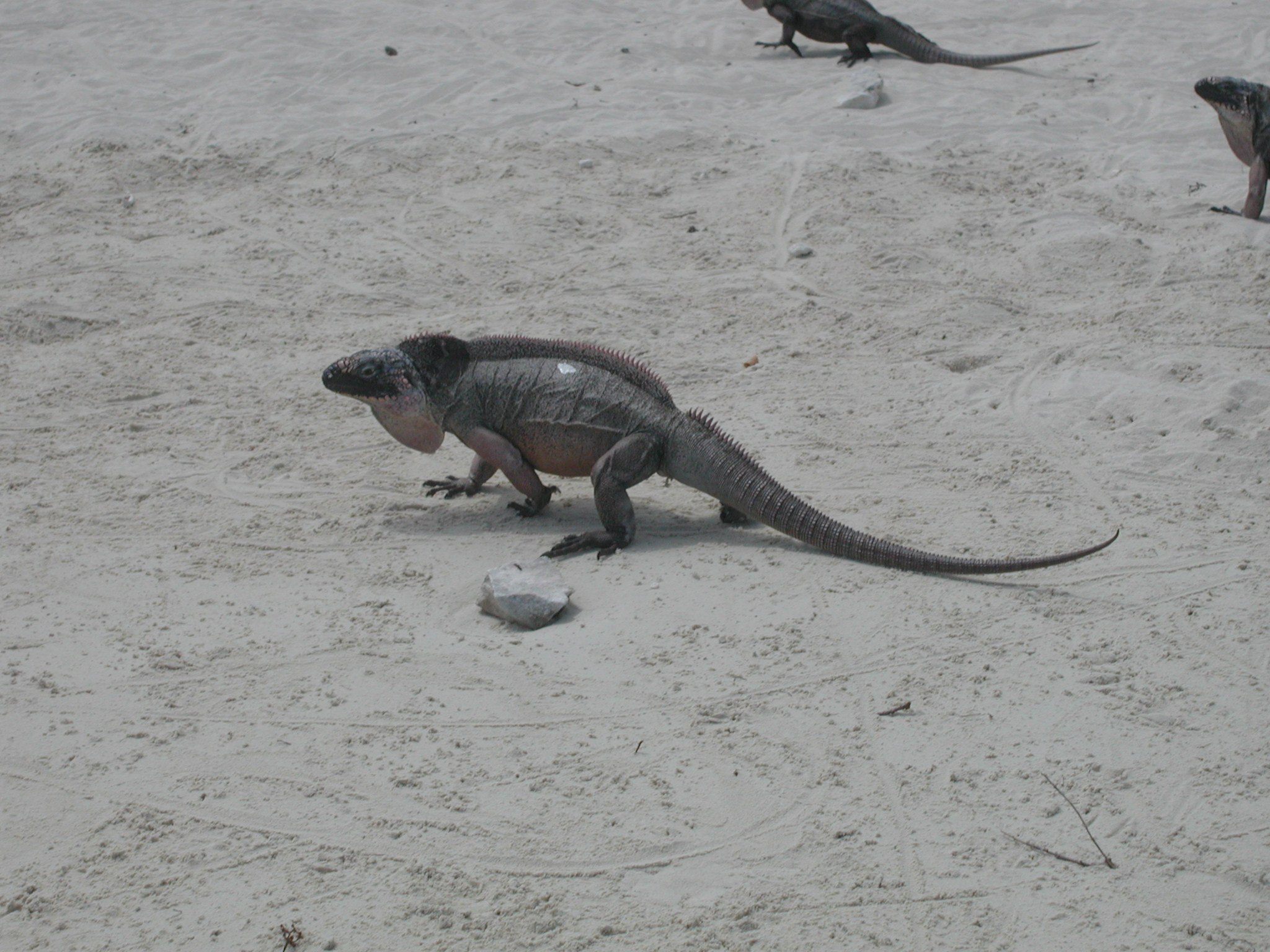 Allen's Cay Iguana Cyclura cychlura inornata